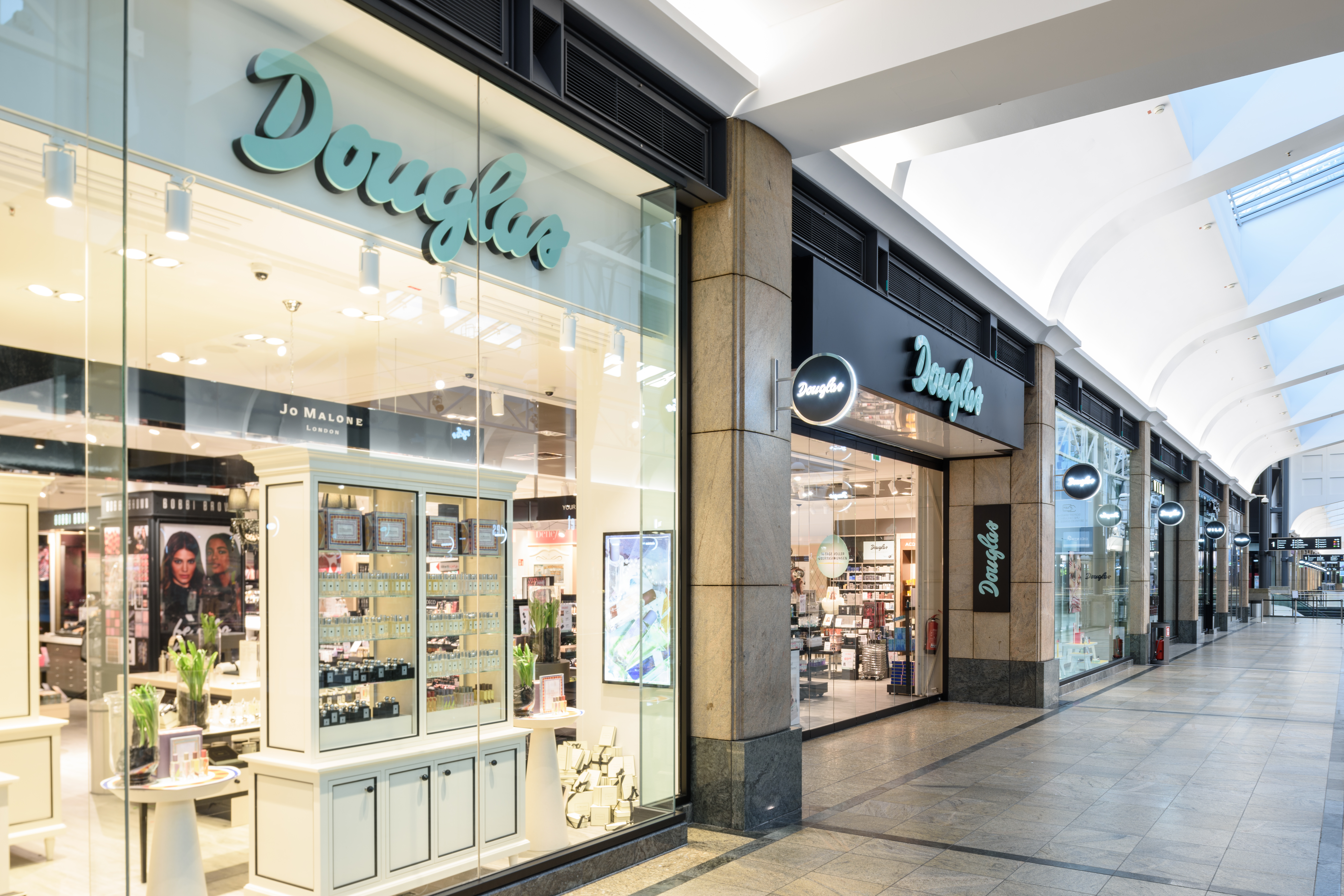 Innenansicht einer Douglas Filiale